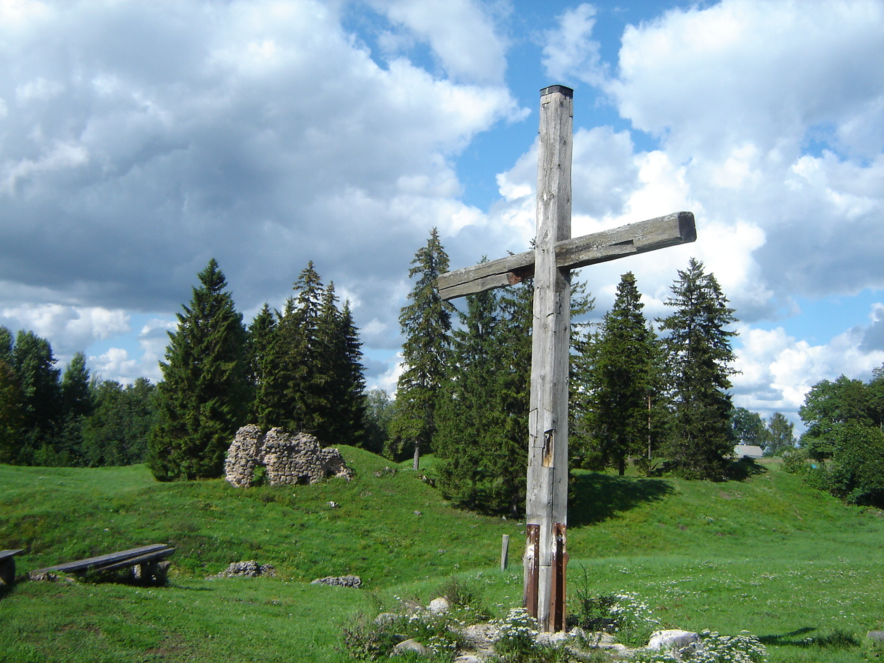 Karksi ordulinnuse varemwed. Rist sisehoovil ja pealinnuse jäänused.